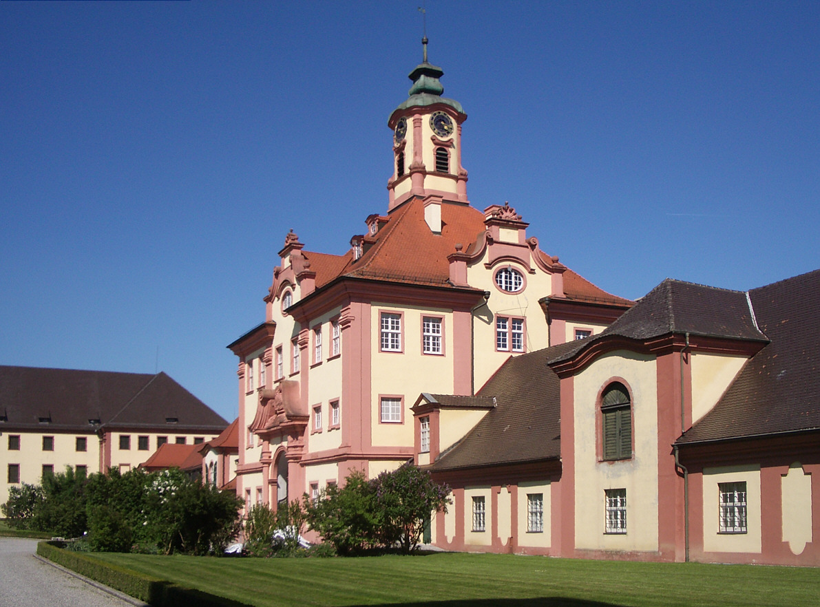 Altshausen, Germany: Schloss, Torgebäude, vom Schlosshof